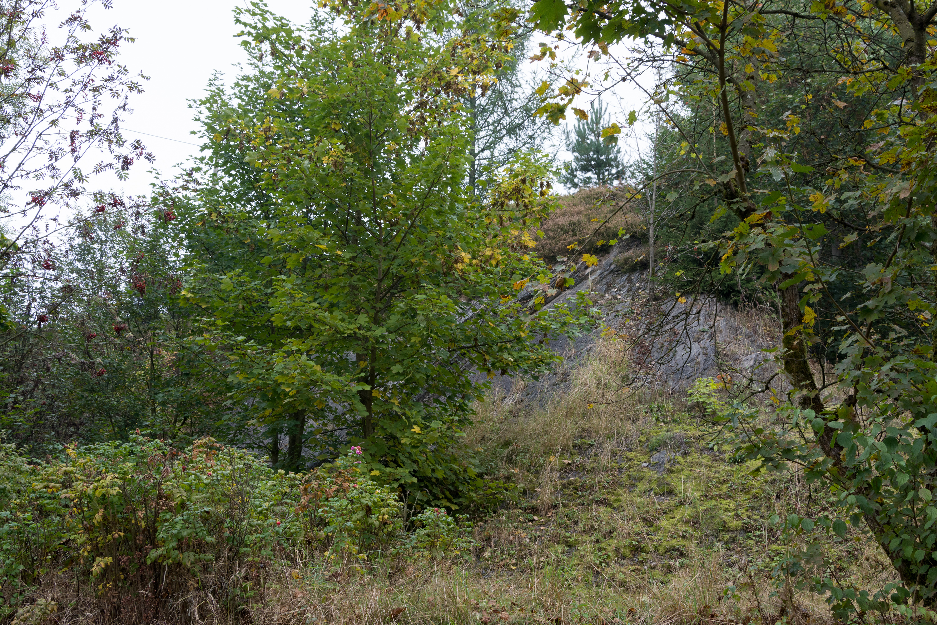 Ehemaliger Steinbruch bei Haßlach bei Teuschnitz.